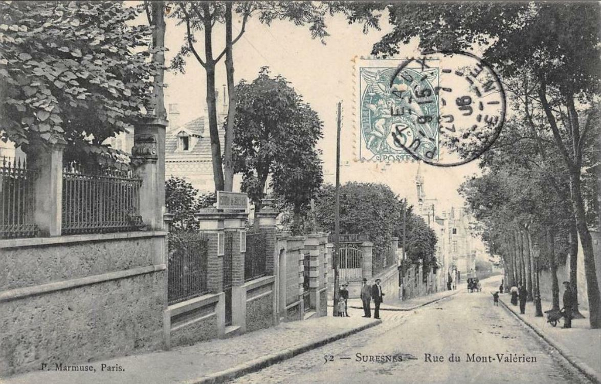 Suresnes.Rue du Mont-Valérien.Passants